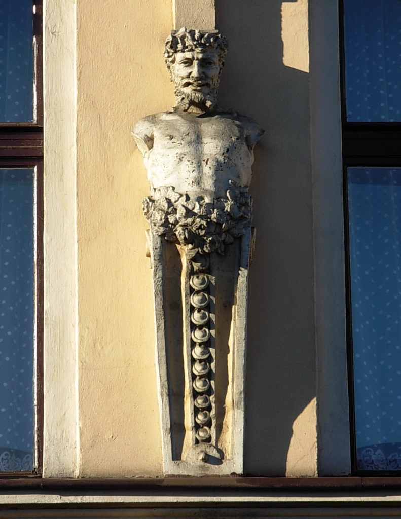 Kamienica ul. Gdańska 63 w Bydgoszczy - detal